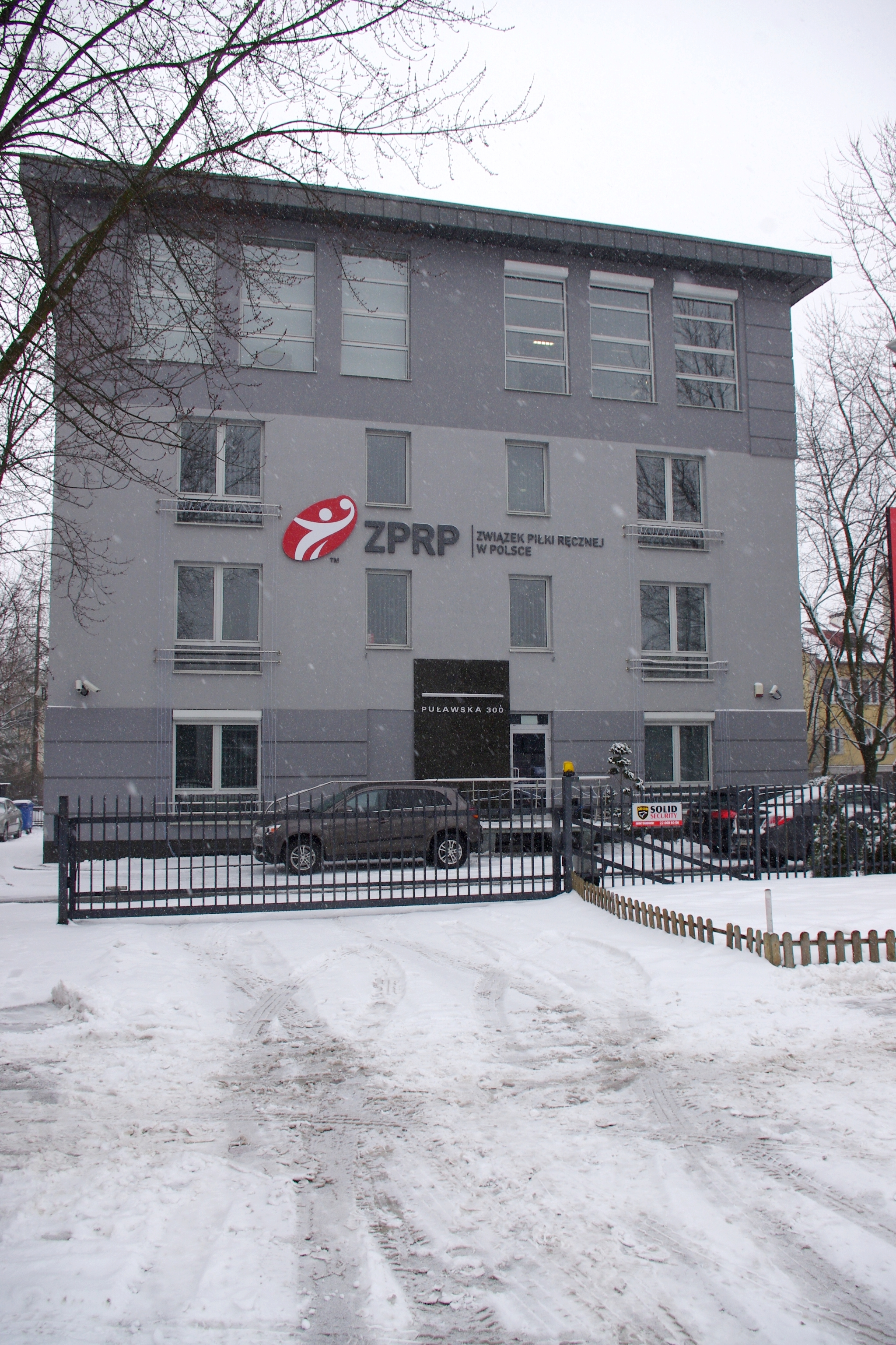 Siedziba Związku Piłki Ręcznej w Polsce przy ul. Puławskiej 300 w Warszawie